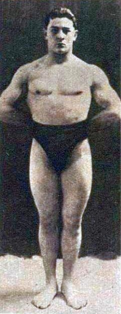 Henri Deglane, champion olympique de lutte gréco-romaine poids lourds, (+82.5 kg) en 1924.